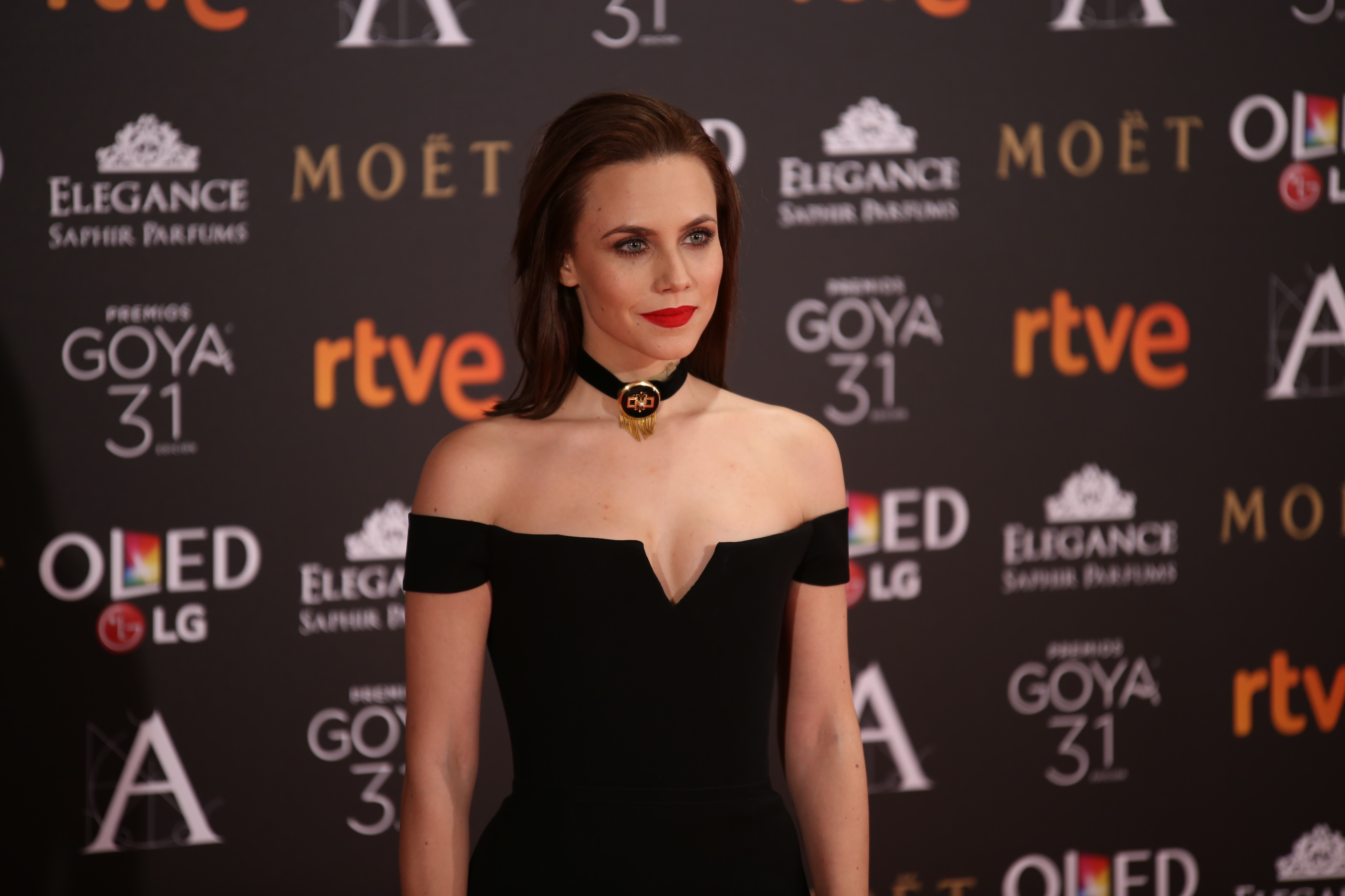 Premios Goya 2017